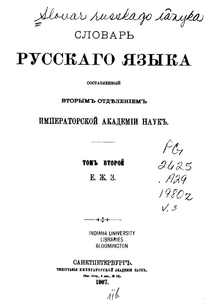 Словарь русского языка, составленный Вторым отделением Императорской академии наук. Том 2. Е, Ж, З. СПб., 1907